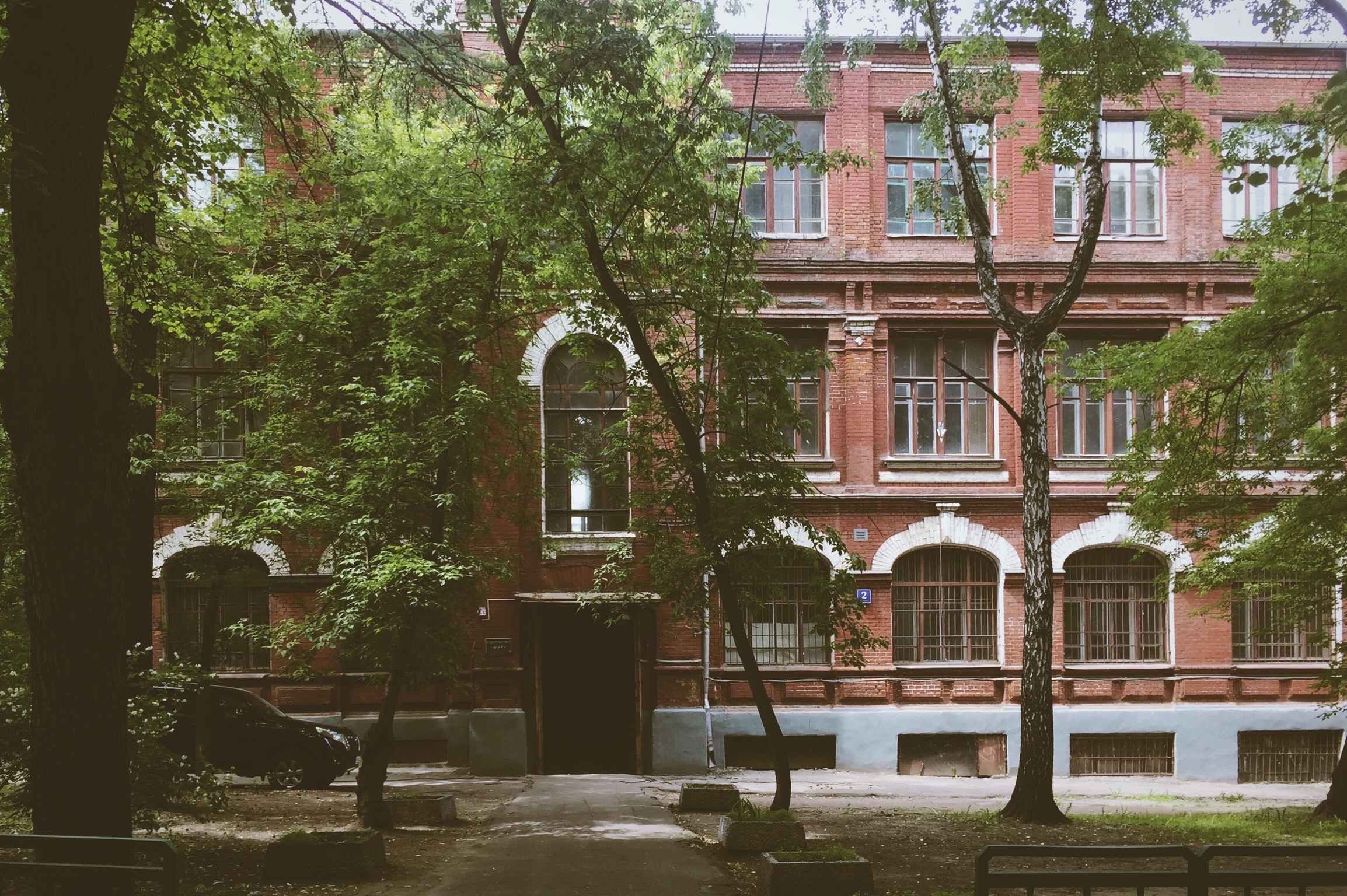 1-й Рижский переулок. Бывшее странноприимное общежитие с богадельней